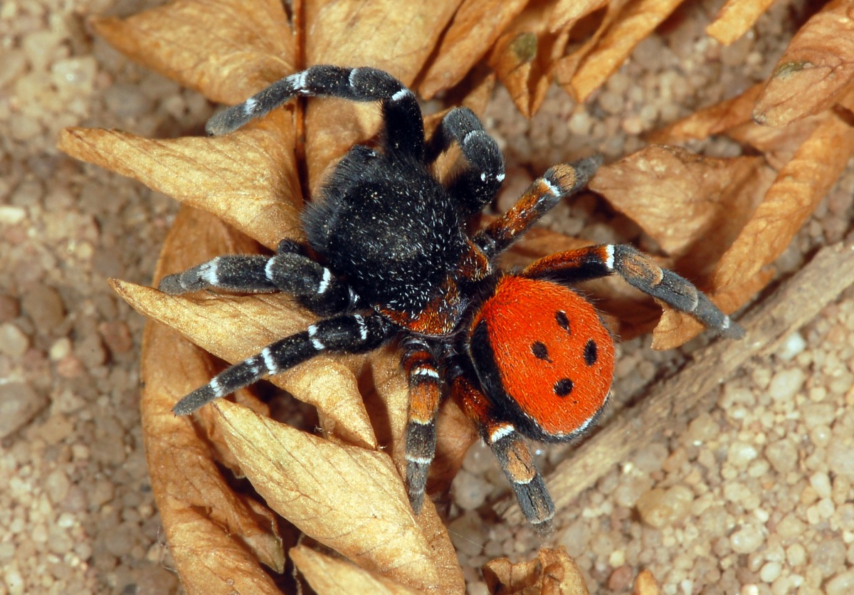 Eresus kollari, Pfungstädter Düne, Pfungstadt, Hessen, Deutschland